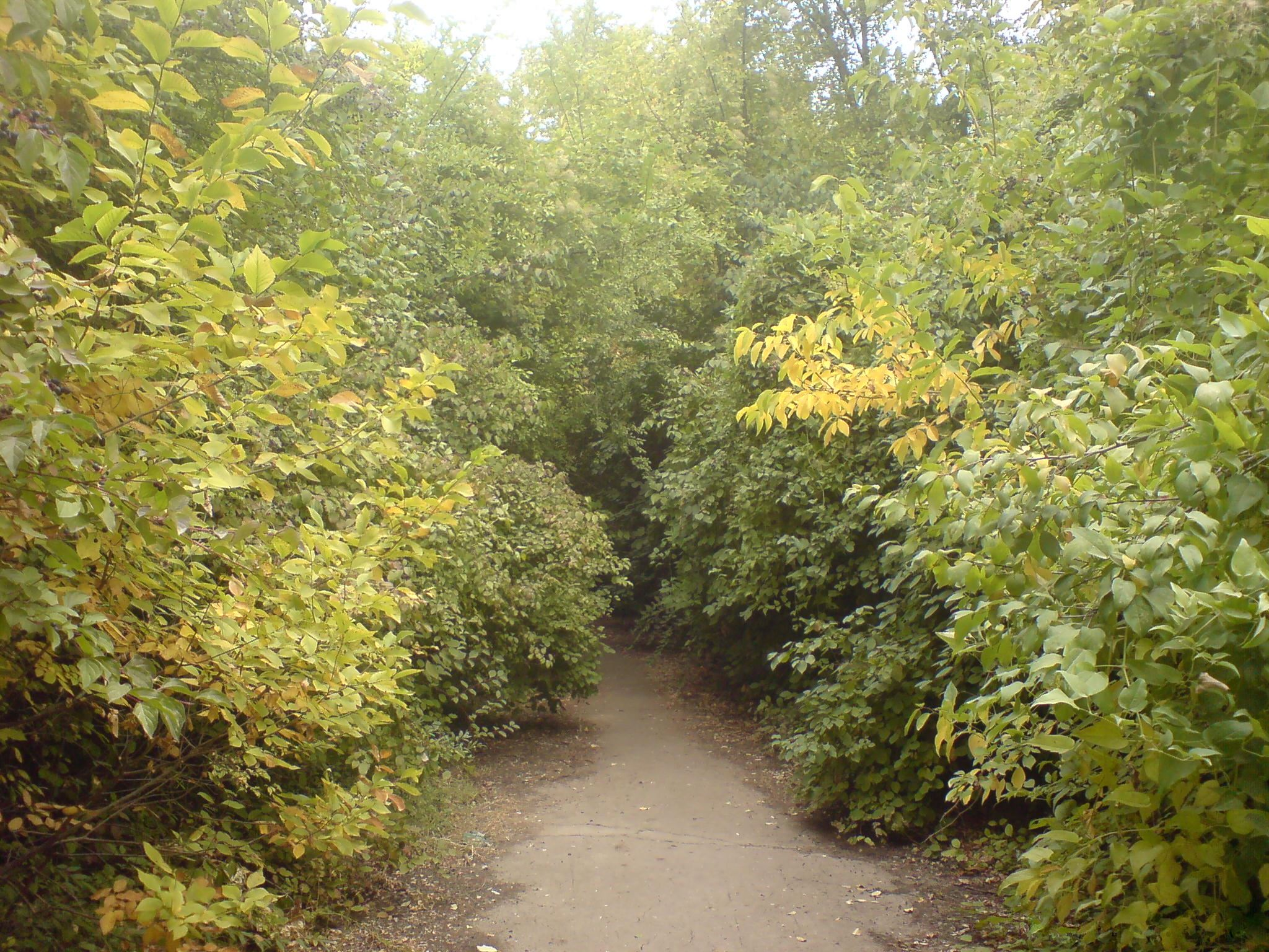 Дорожка в Ботаническом саду города Ташкента, восточноазиатская коллекция